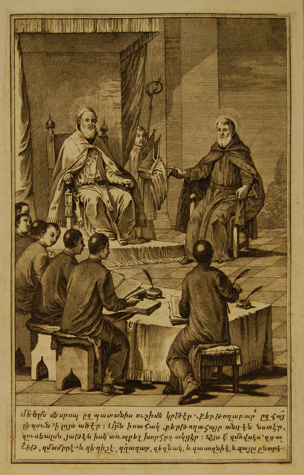 Страница из изданий Мхитаристов